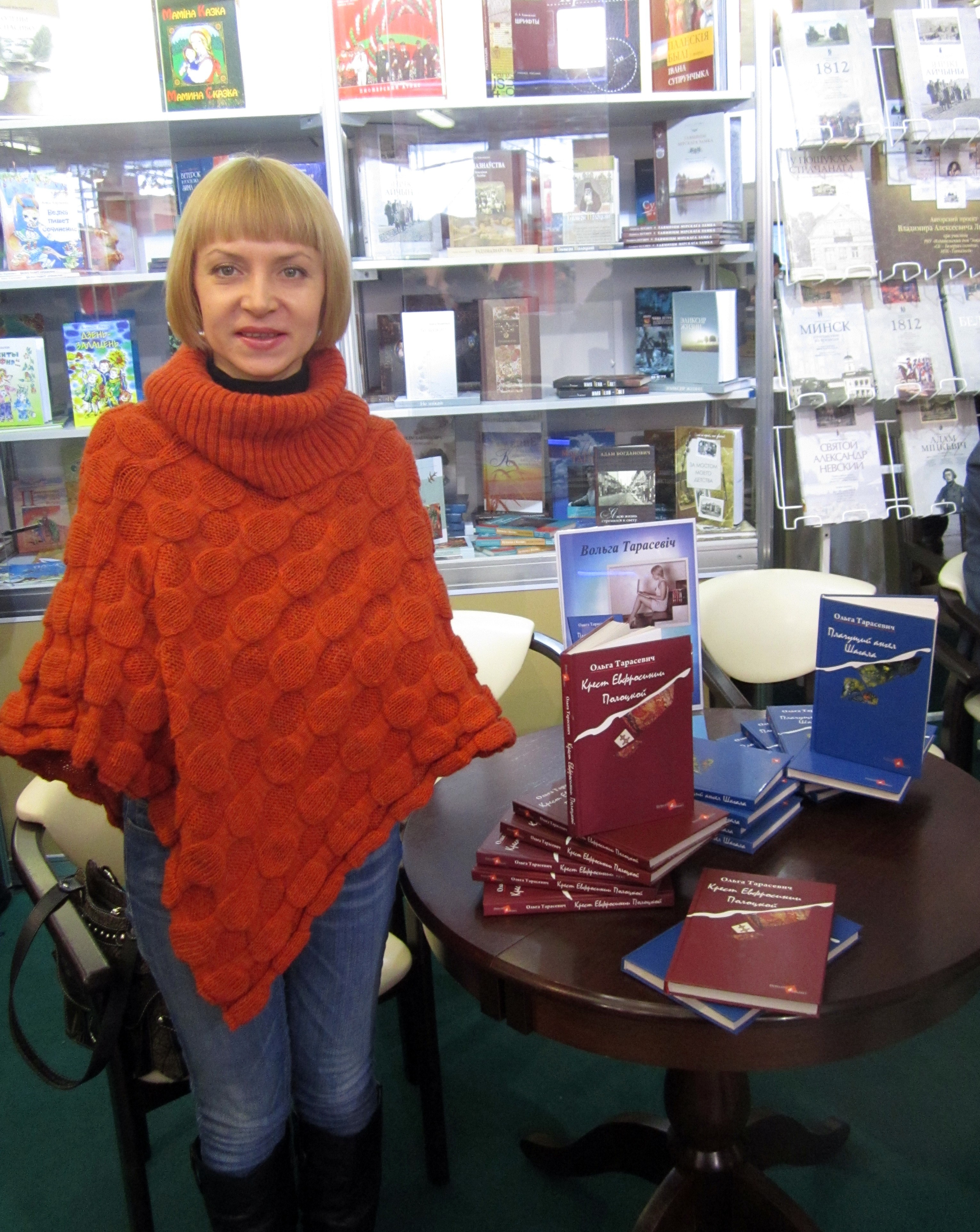 Писательница Ольга Тарасевич на презентации книг, переизданных в издательском доме «Звязда». 9 февраля 2013. Минск, XX Международная книжная выставка.